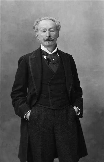 Charles Haas (1832,1833-1902)